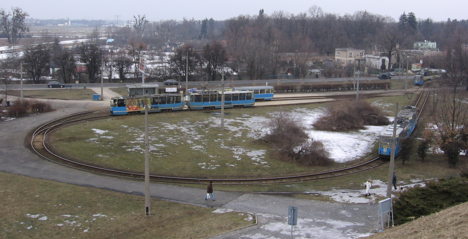 Tramway loop in Wrocław - Oporów, Poland